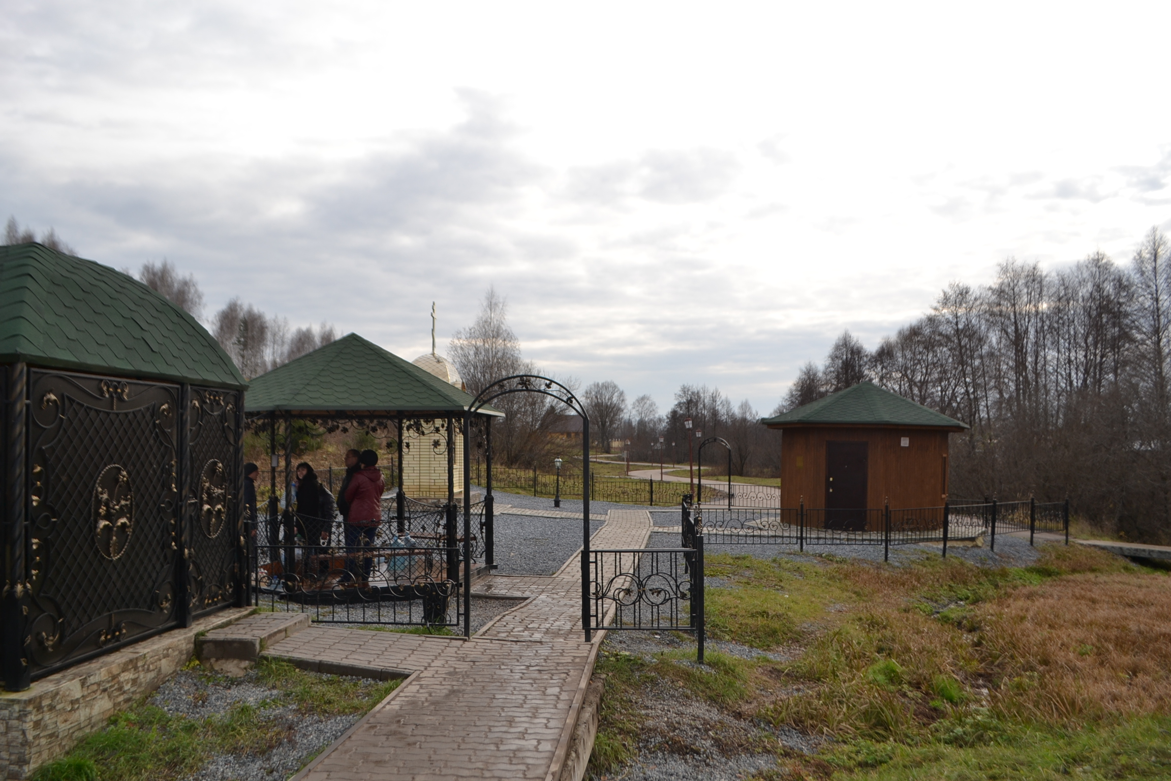 Среднее Девятово. Источник Николая чудотворца